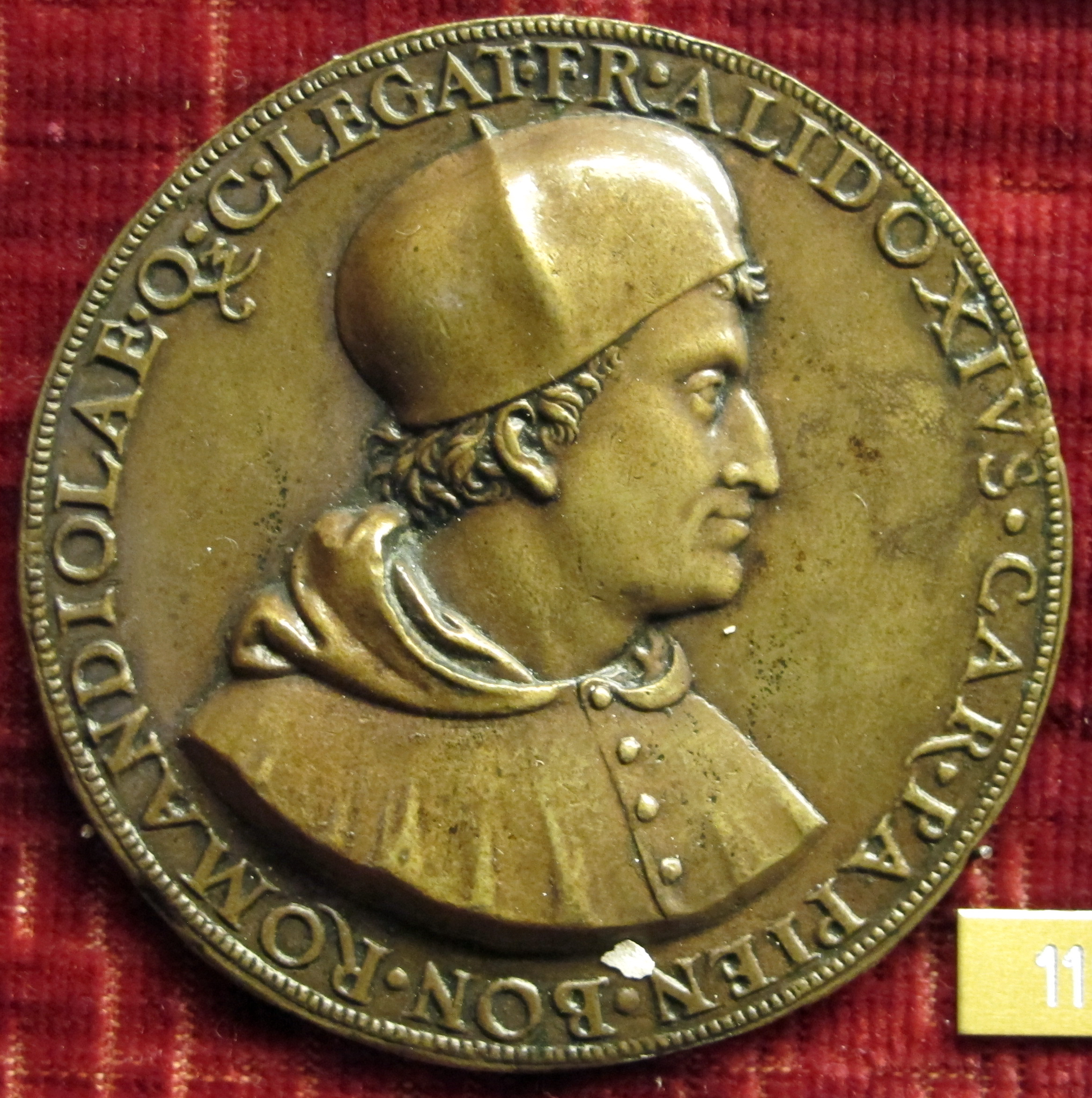 Scuola bolognese dopo il francia, medaglia di Francesco Alidosi (1455-1511), cardinale